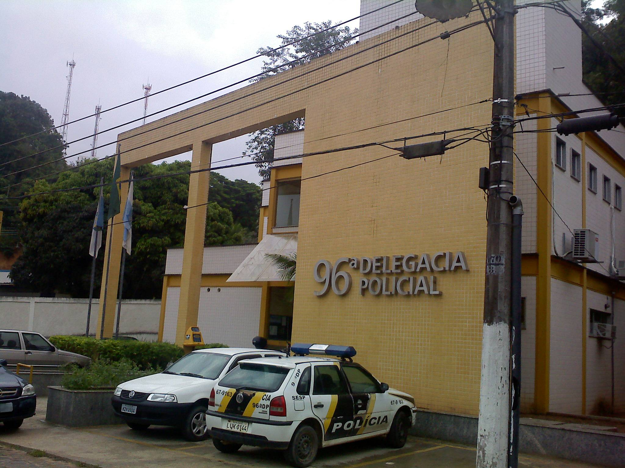 Police station - Miguel Pereira city - Rio de Janeiro state - Brazil